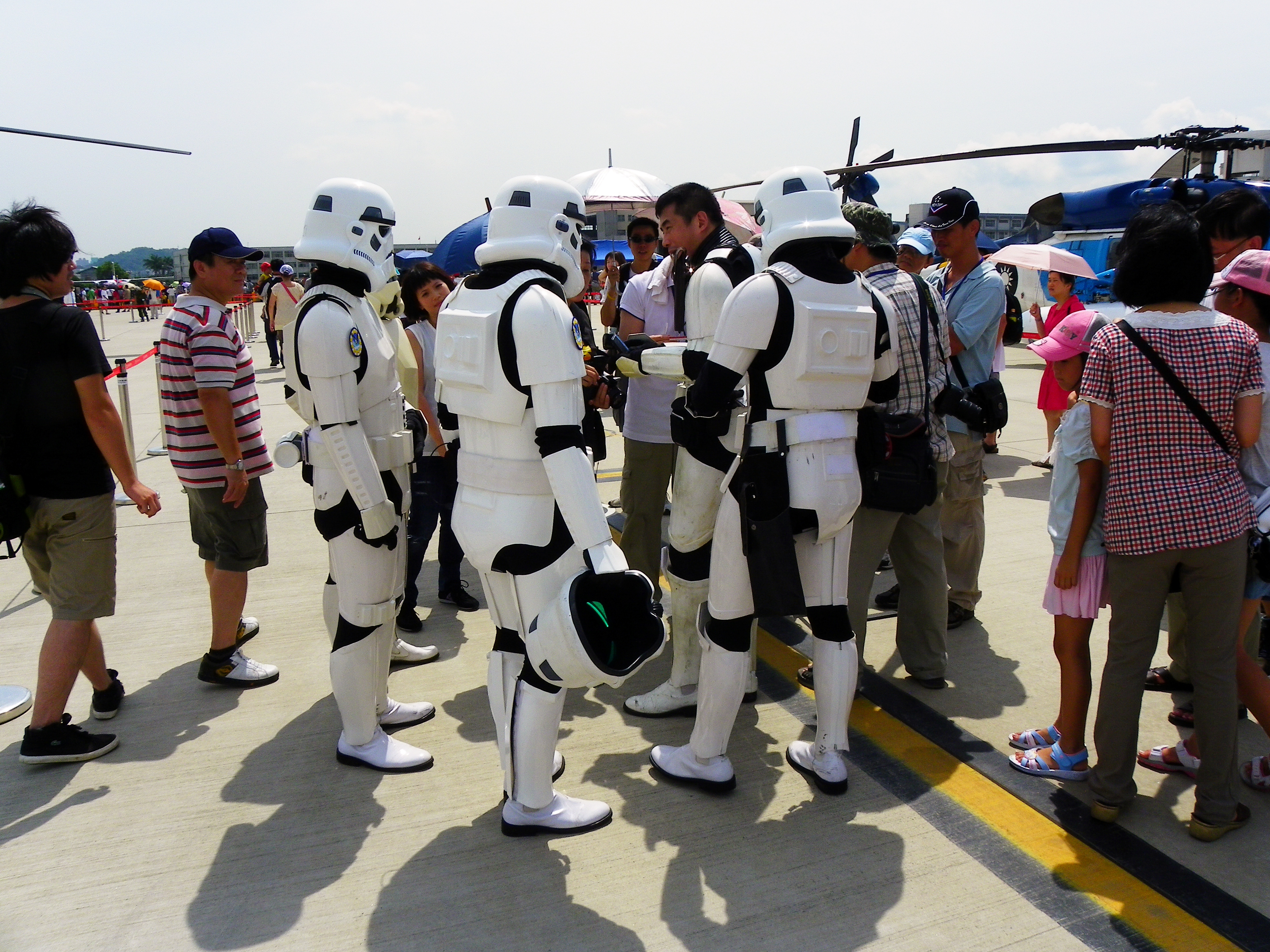 中文（台灣）: 2011年8月13日中華民國空軍松山基地營區開放活動中，為創世社會福利基金會募集統一發票的《Star Wars》帝國軍第501師臺灣駐軍，發言人接受媒體訪問。